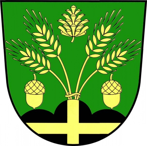 znak,Leština , okres Ústí nad Orlicí